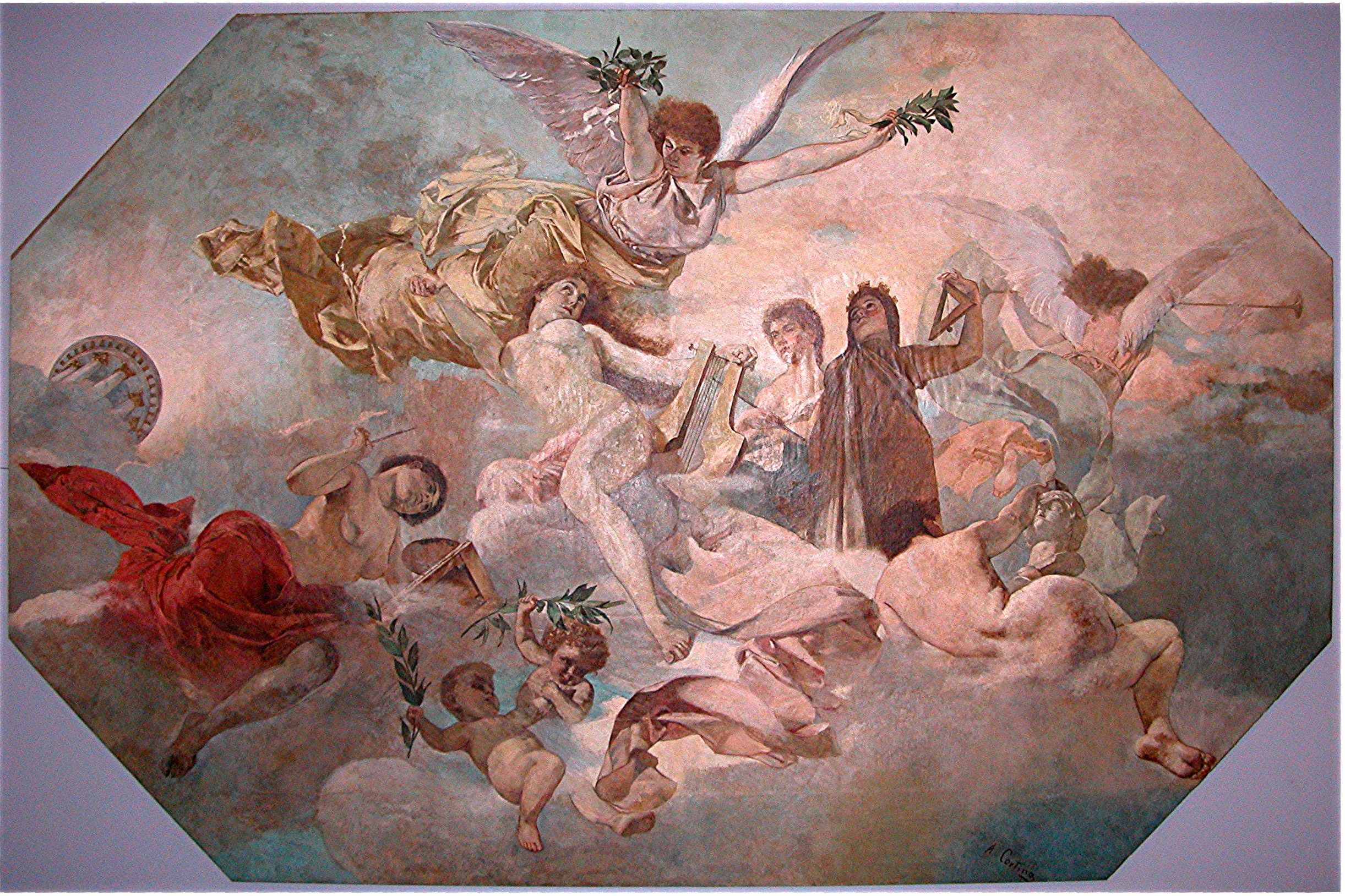 En su momento estaba pegado al techo de un salón.